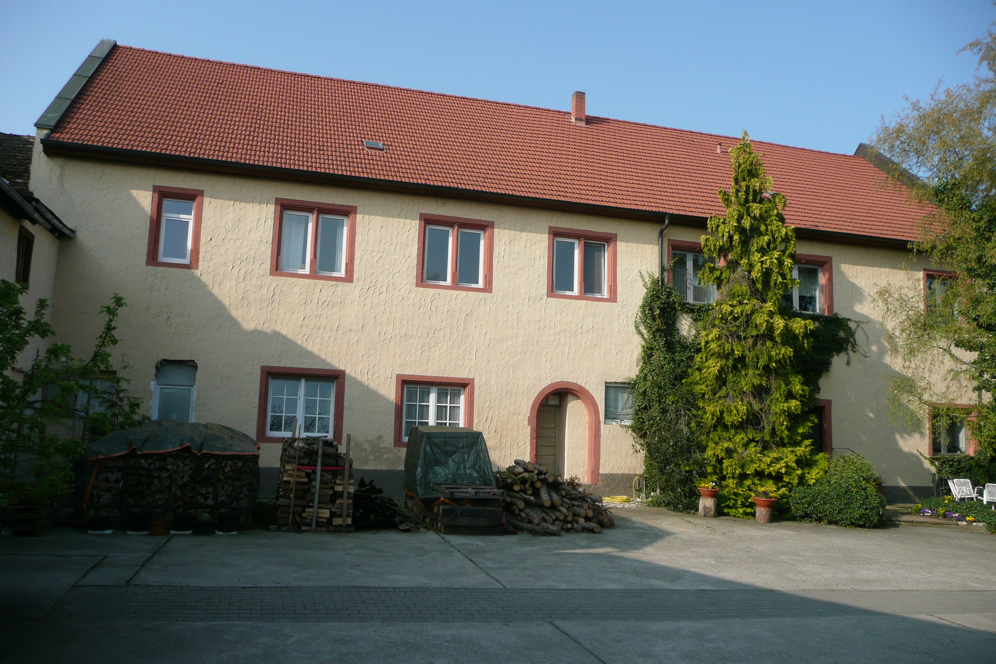 Worms-Ibersheim, ältestes Schloß von Worms, vom Schloßhof gesehen